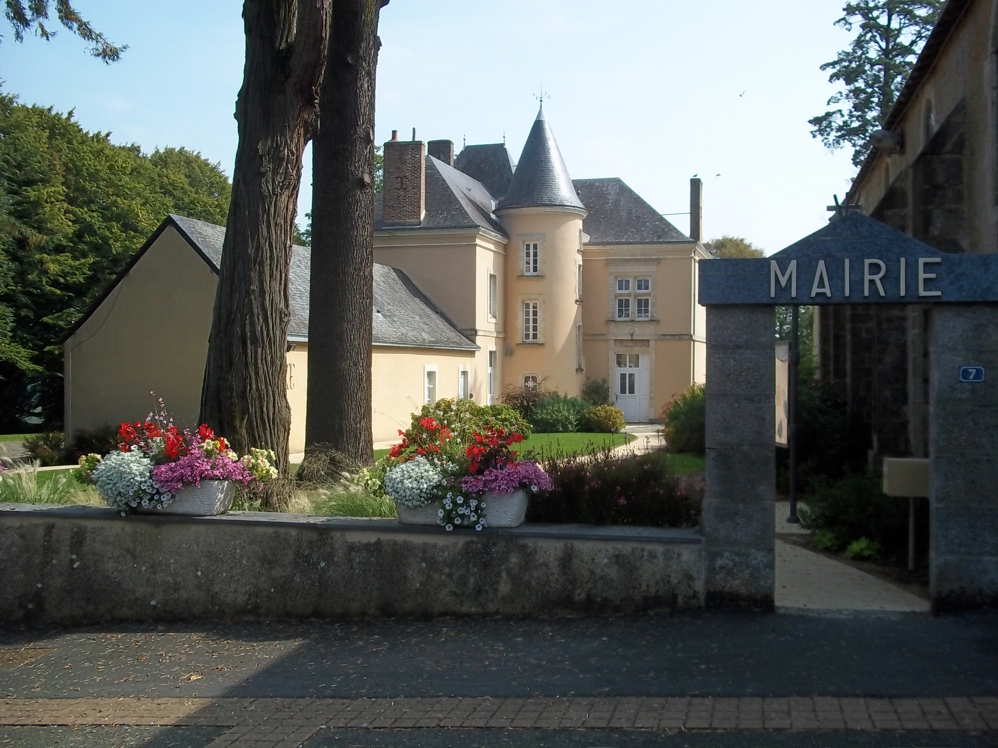 Mairie de Joué-en-charnie